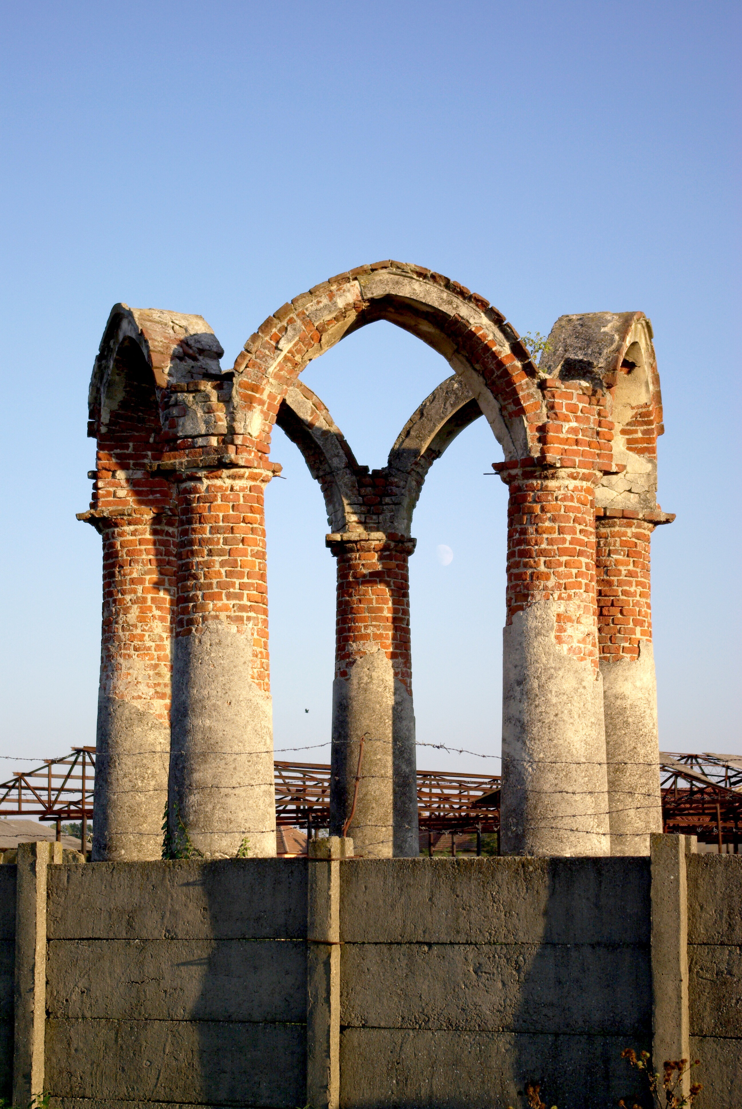 Glorieta din apropierea Castelului Banloc 02